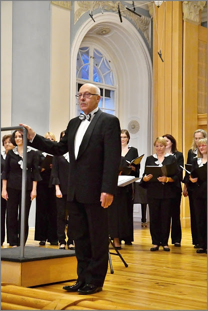 Ivan Zelenka, Michnův palác 2018